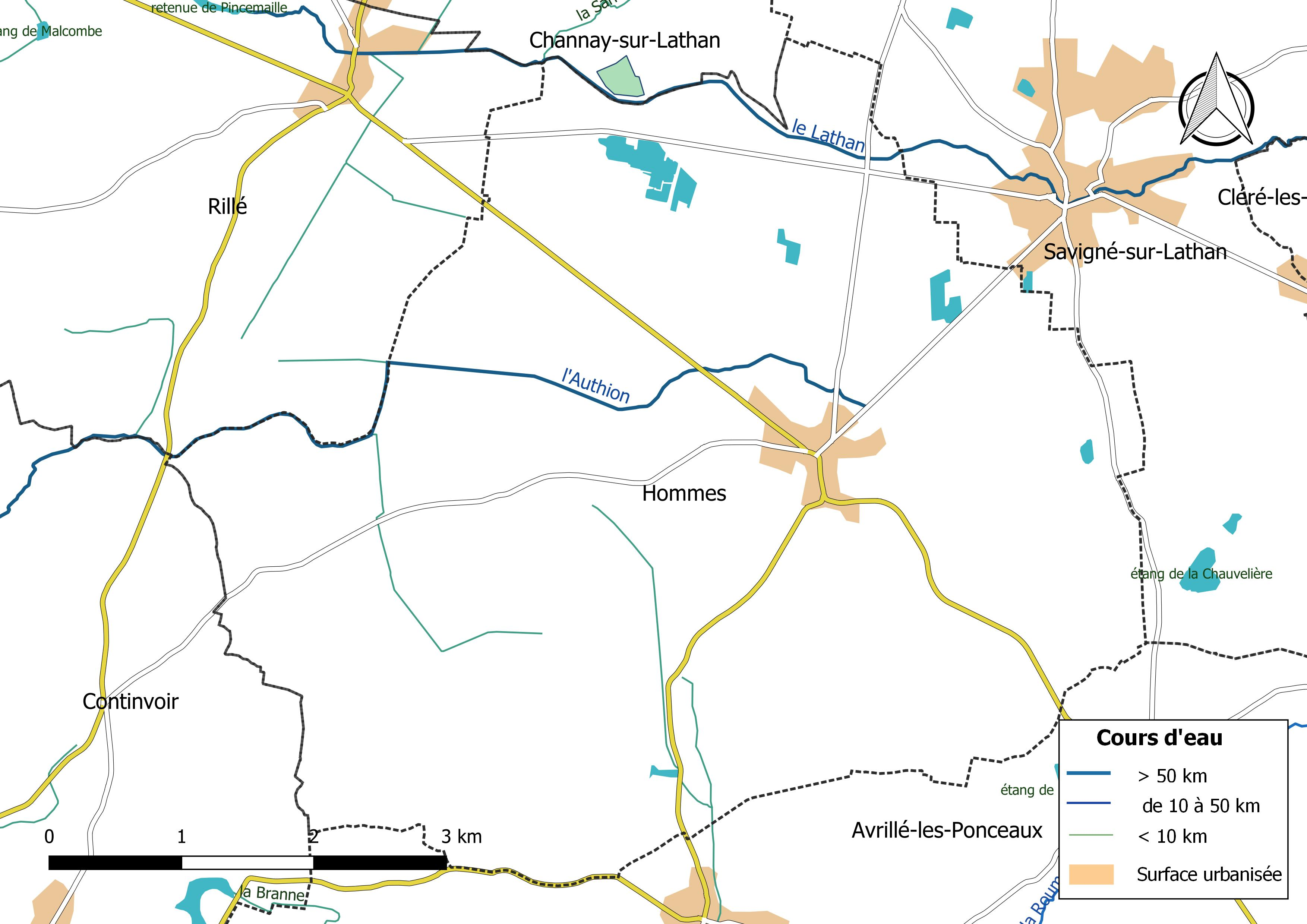 Carte du réseau hydrographique de la commune de Hommes (France).